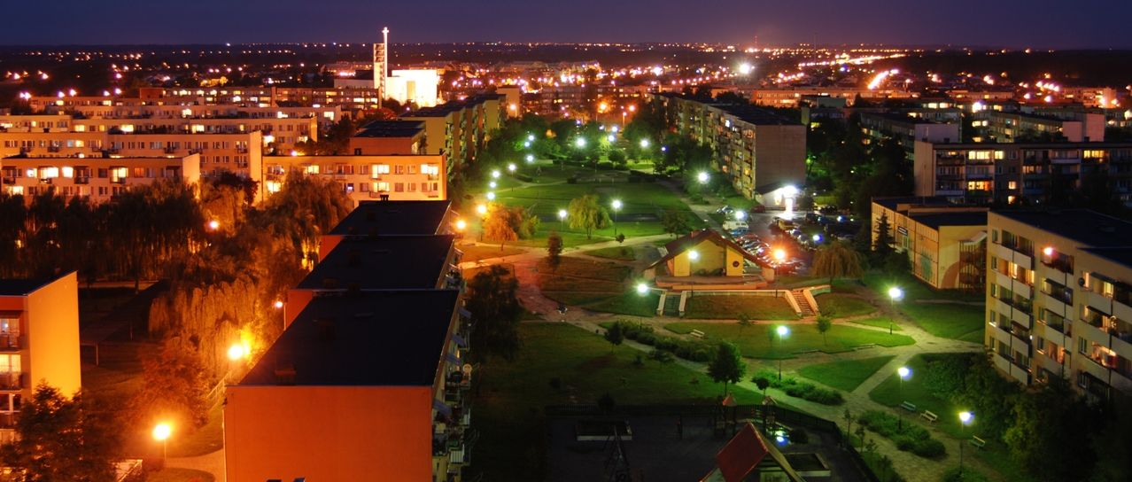 Tarnobrzeg, Panorama nocna osiedla Serbinow